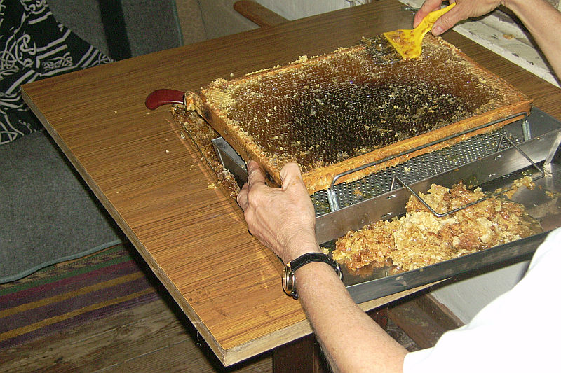 Honigwaben entdeckeln